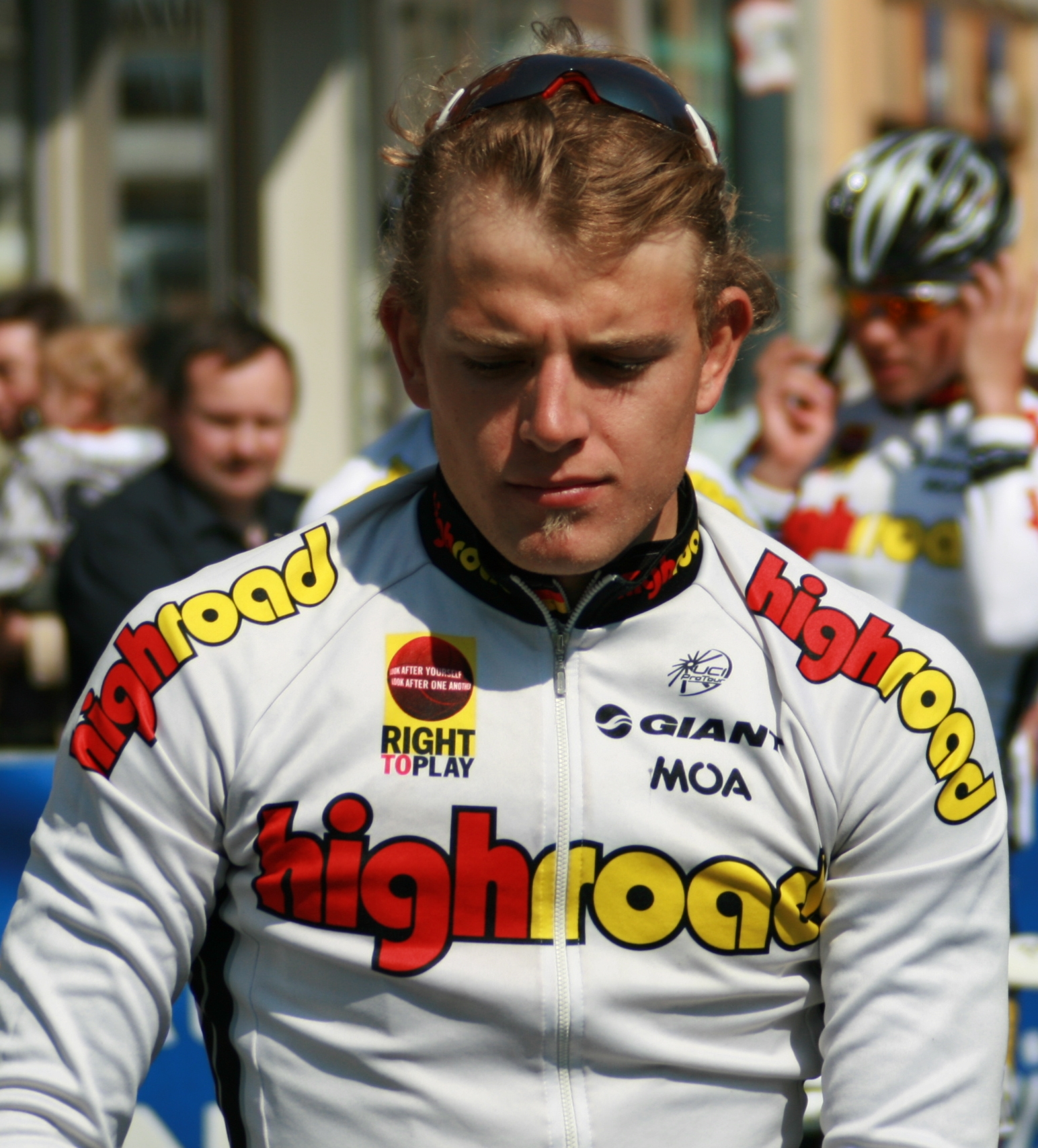 Gerald Ciolek aux Quatre jours de Dunkerque 2008